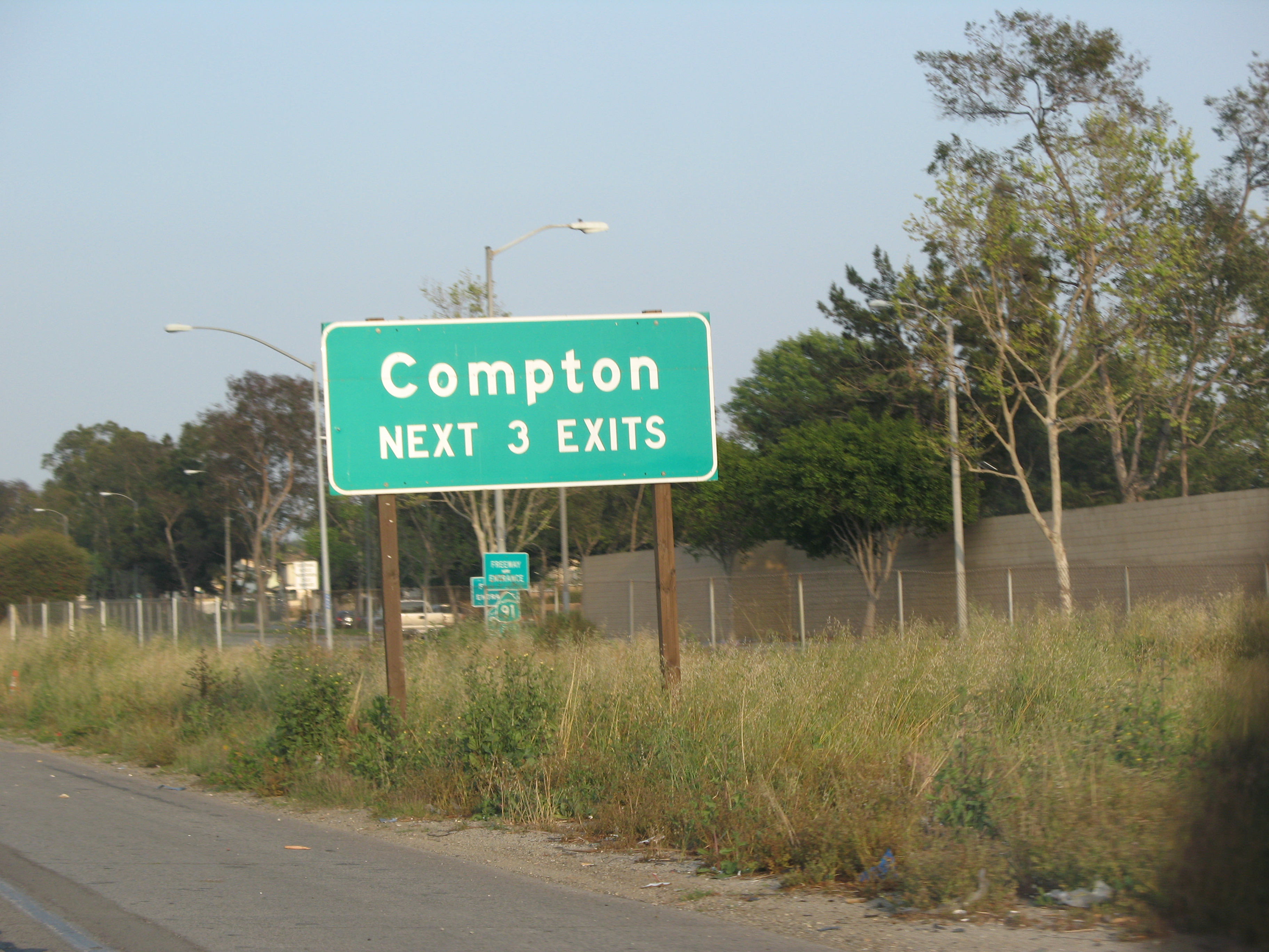 compton